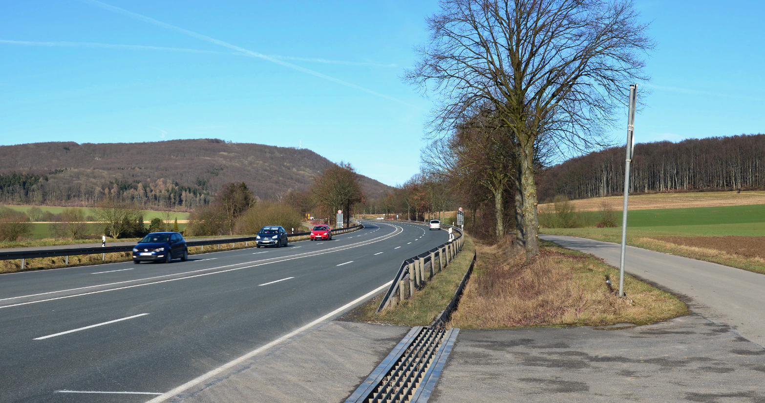 B217